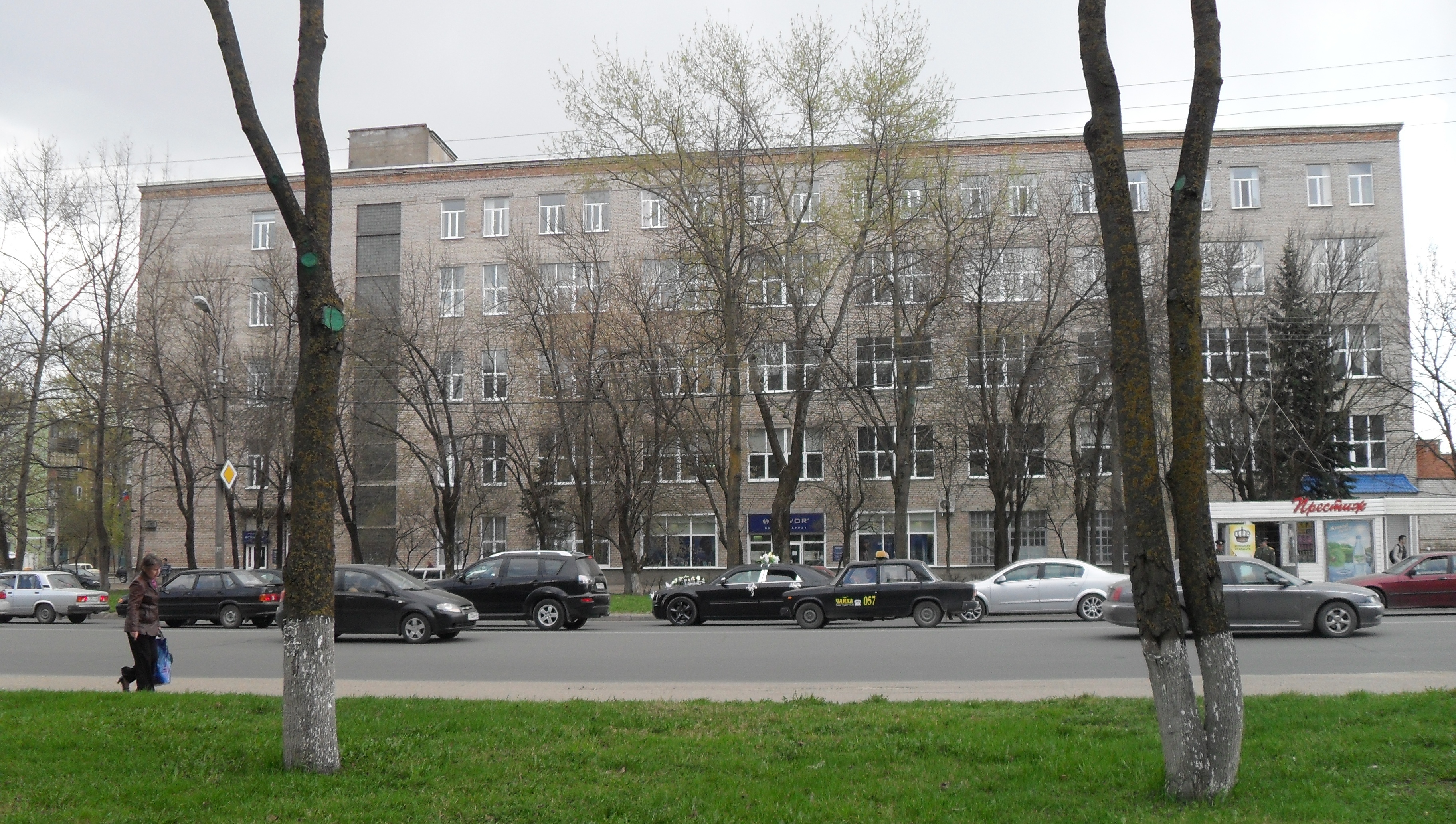 Швейная фабрика "Славянка" (торговая марка Truvor), г. Псков